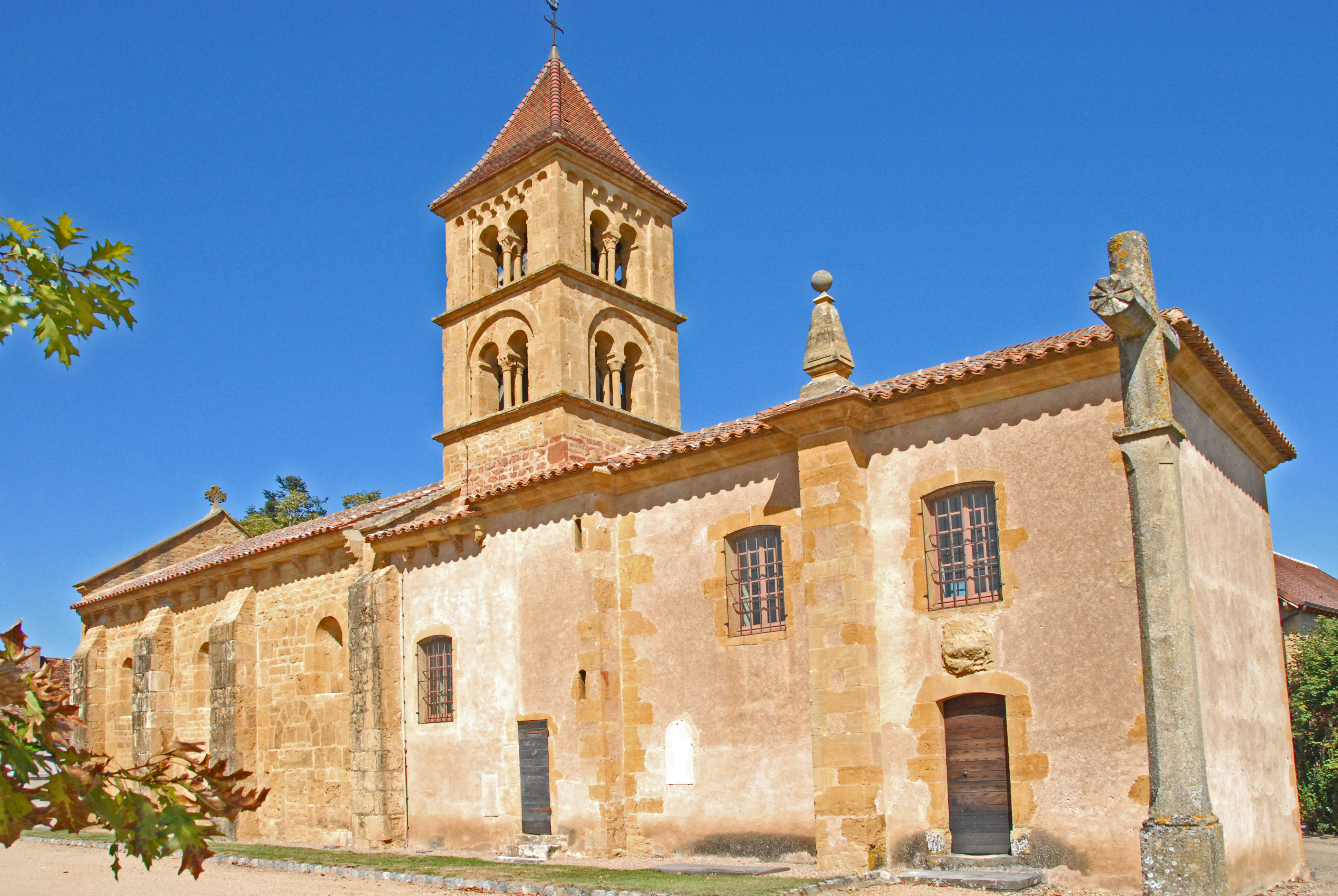 Sts-Pierre-et-Paul de Montceaux-l'Étoile, von SO